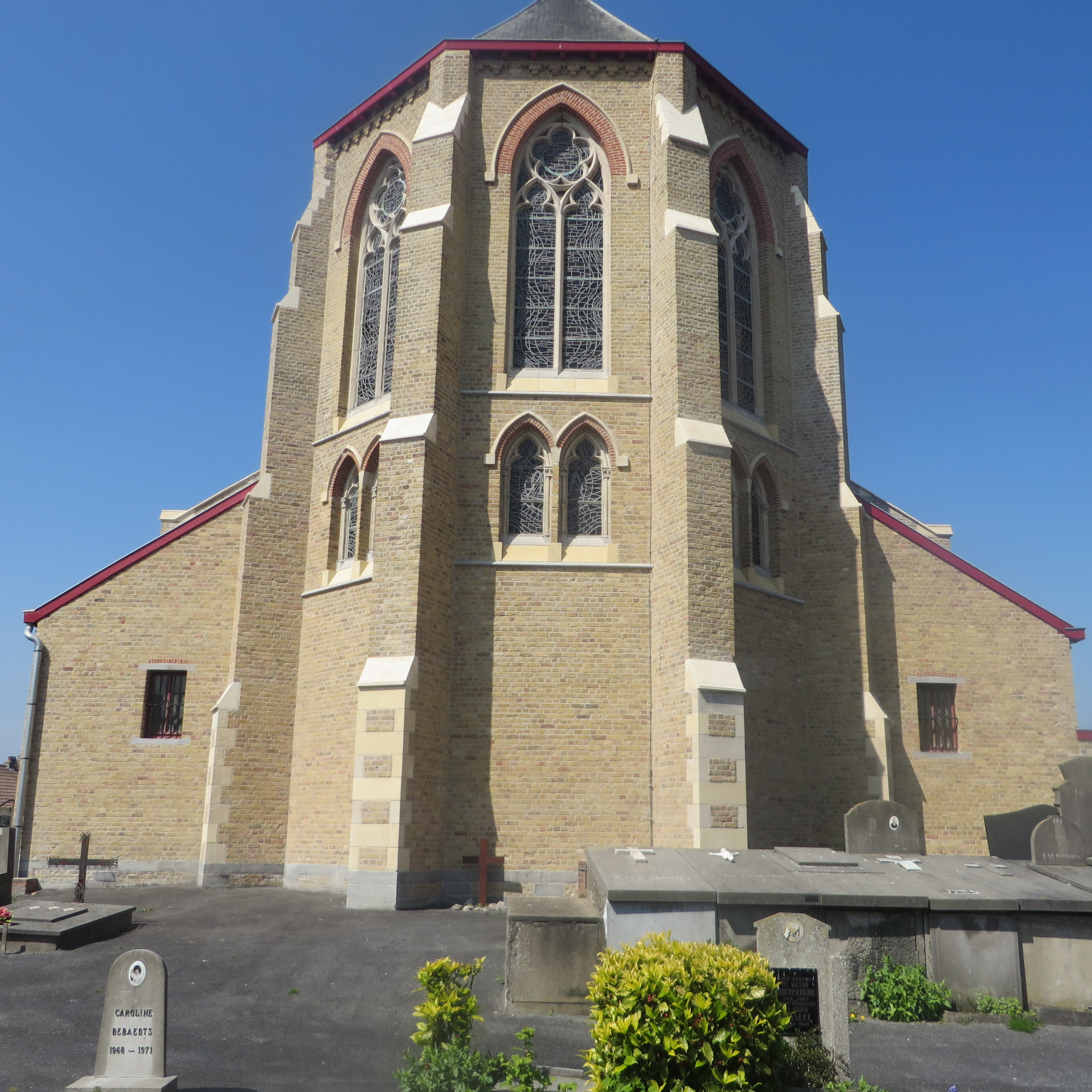 Zijaanzicht kerk